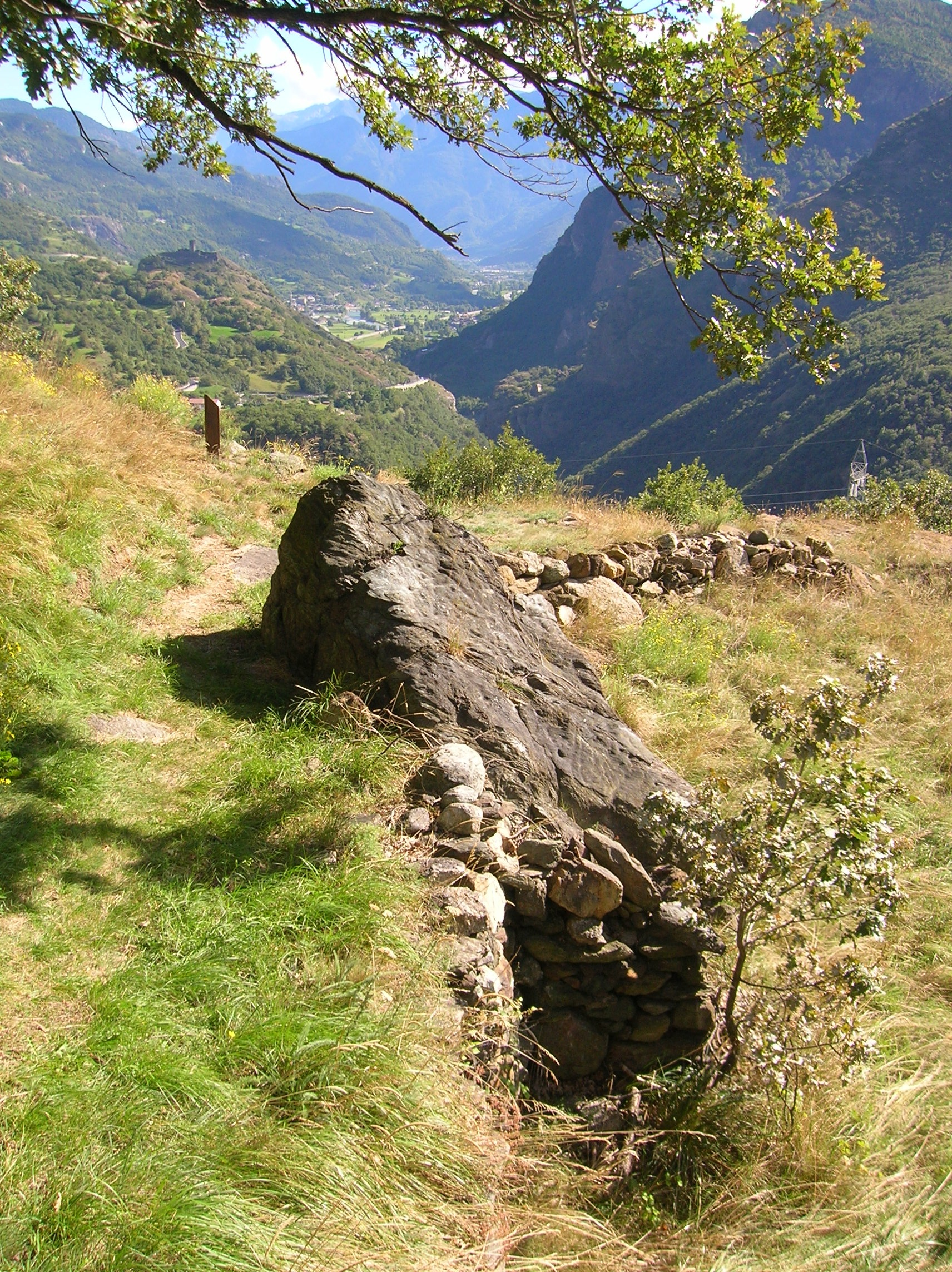 coppelle. Geosito Ponte romano - Tsailleun, Saint-Vincent, Valle d'Aosta, Italia. This is a photo of a monument which is part of cultural heritage of Italy.